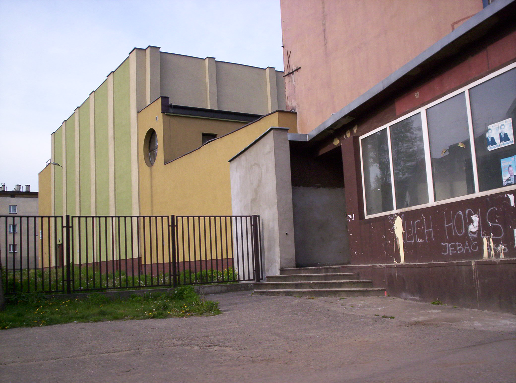 Załęże Kino, Gliwicka Street in Katowice